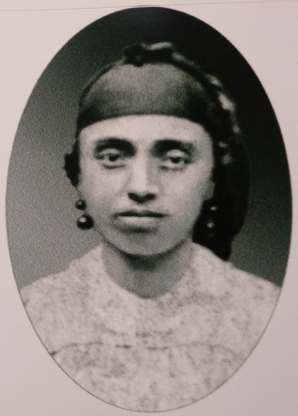 Portrait of Velichka Hashnova (1831 - 1906) in Vasil Levski Museum, Lovech